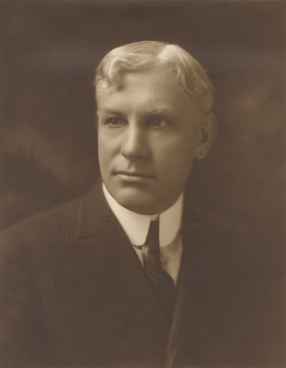 Stephen John Hay